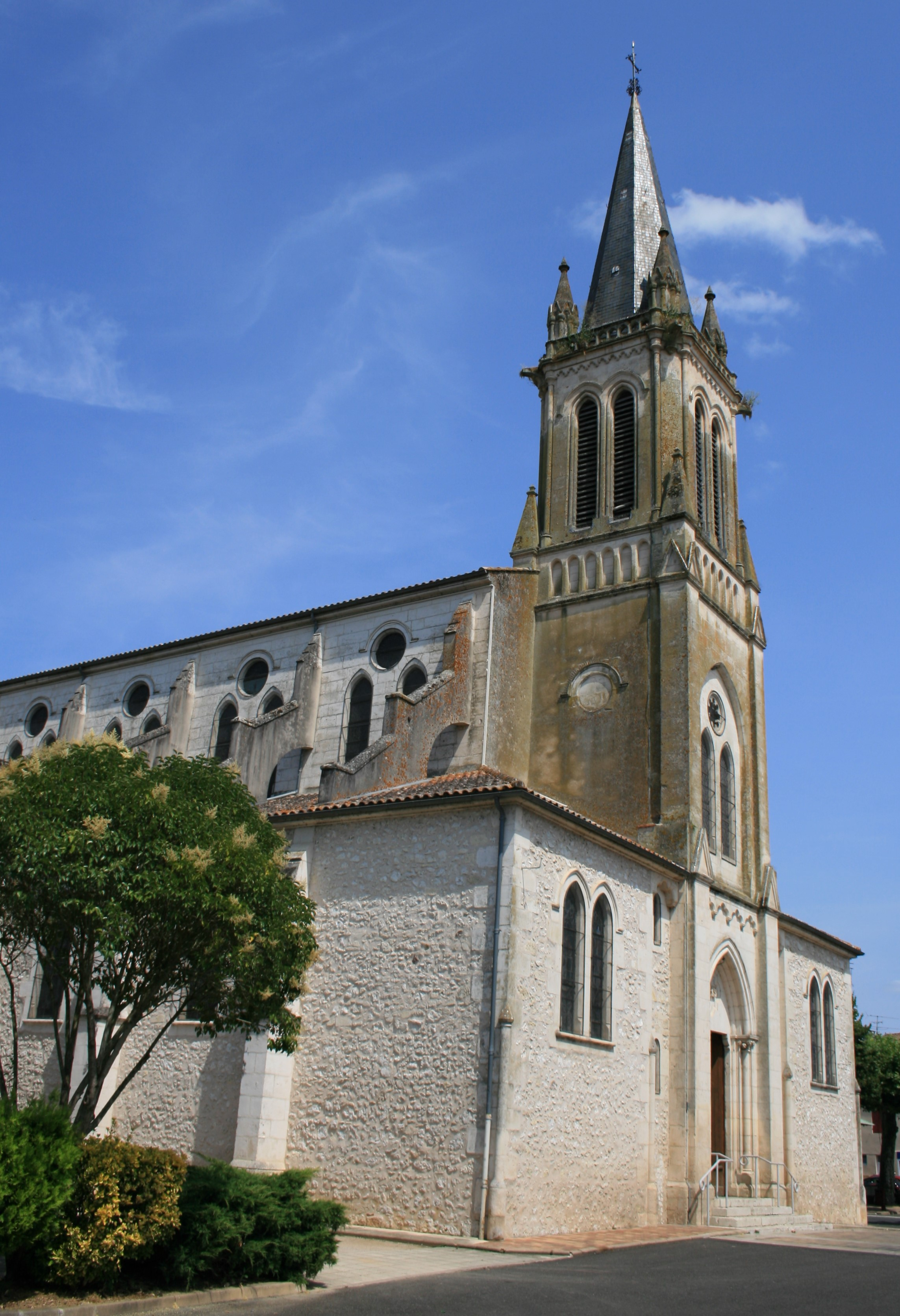 Église catholique Saint-Caprais des Moulins du Lot située dans la commune de Castelmoron-sur-Lot